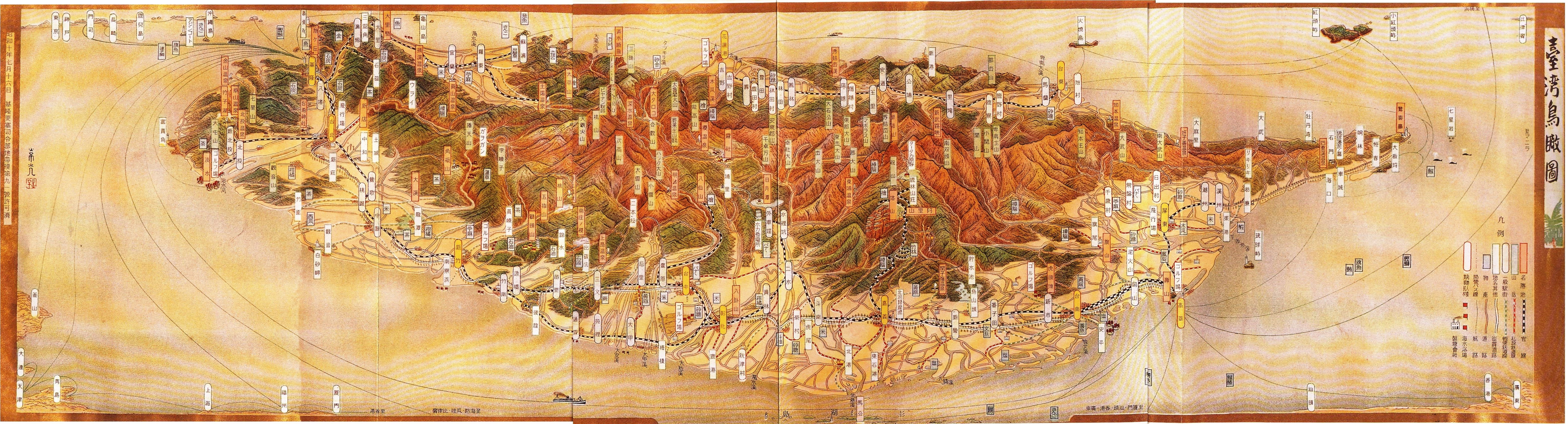 中文（台灣）: 日本所測繪